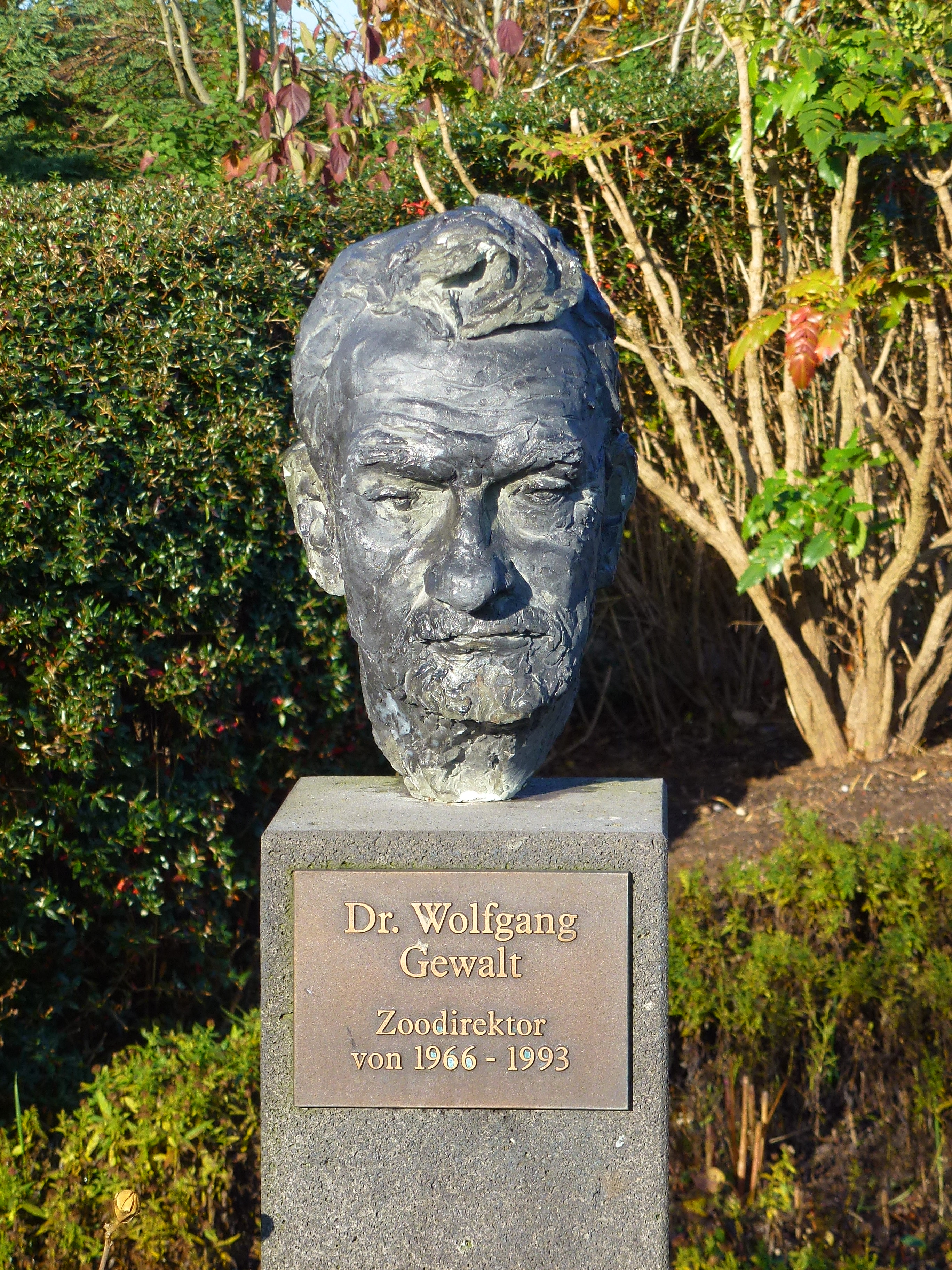 Büste von Dr. Wolfgang Gewalt im Zoo von Duisburg